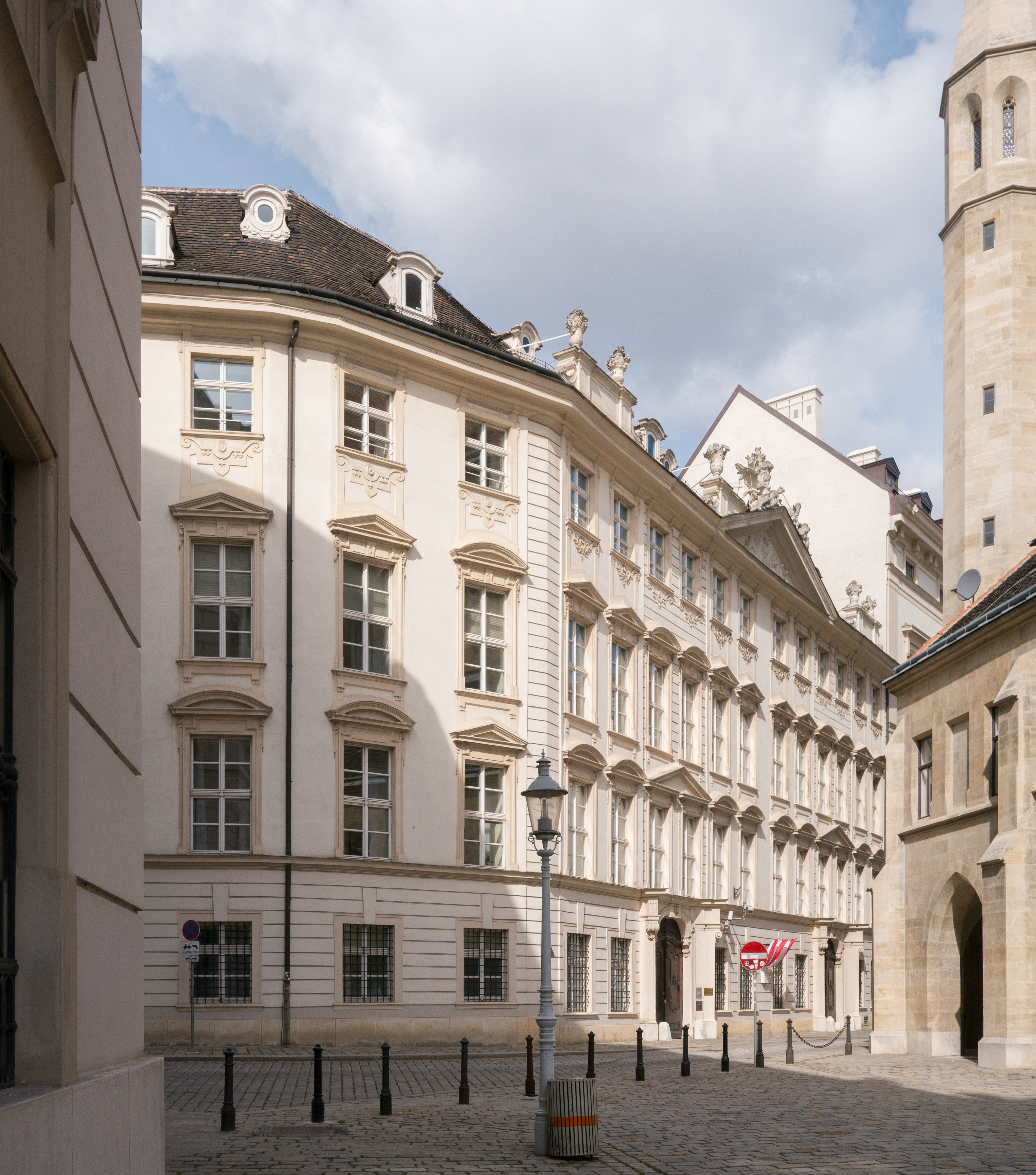 Ehem. Palais Dietrichstein/Palais Mensdorff